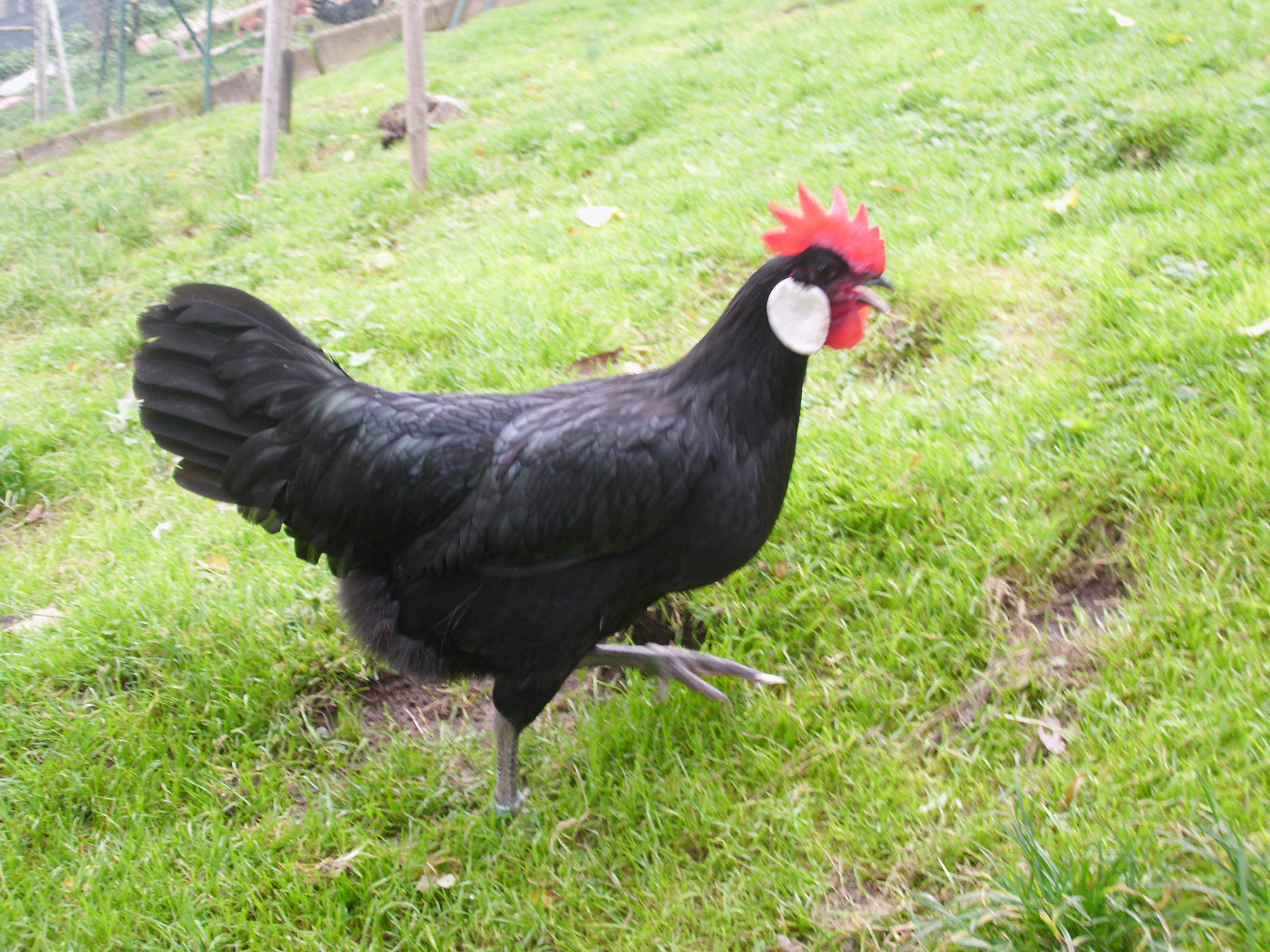 Deitsch: Minorka